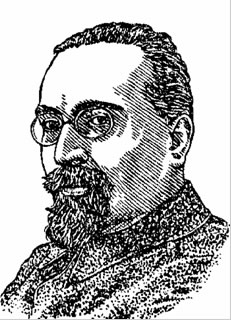 Lev Mikhailovich Karakhan (Лев Михайлович Карахан), Soviet Diplomat (b.1889-d.1937)